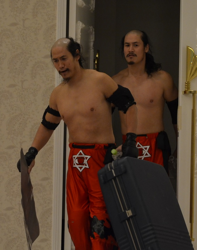 バラモン兄弟